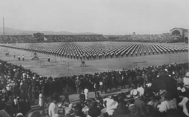 Ljubljanski stadion.